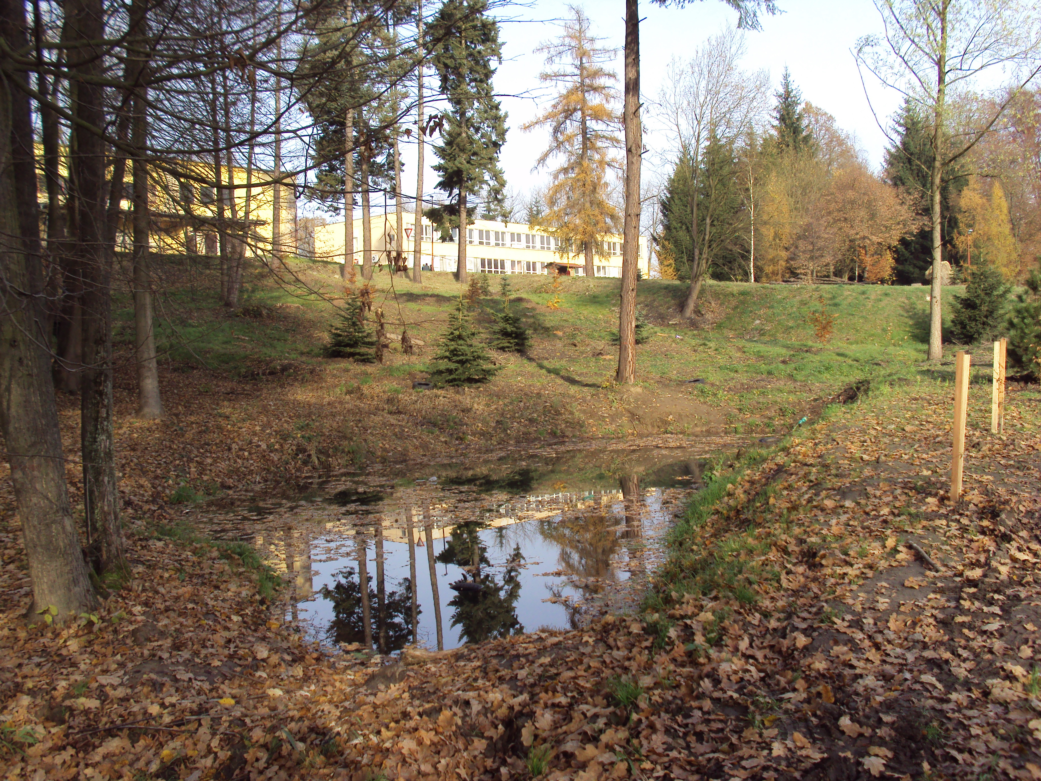 Lesopark s jezírkem v Nových Zákupech